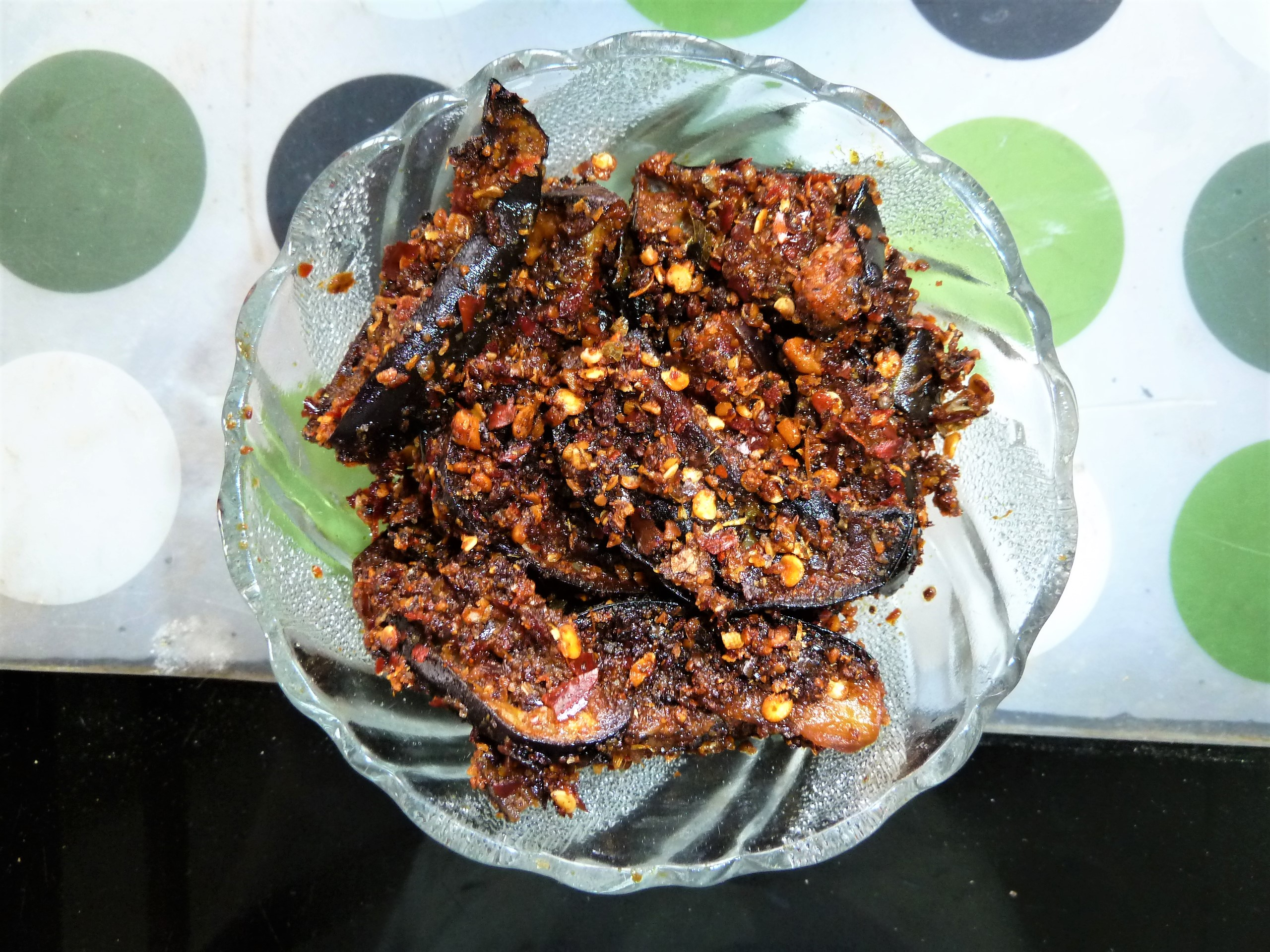 వంకాయ కారప్పొడి కూర